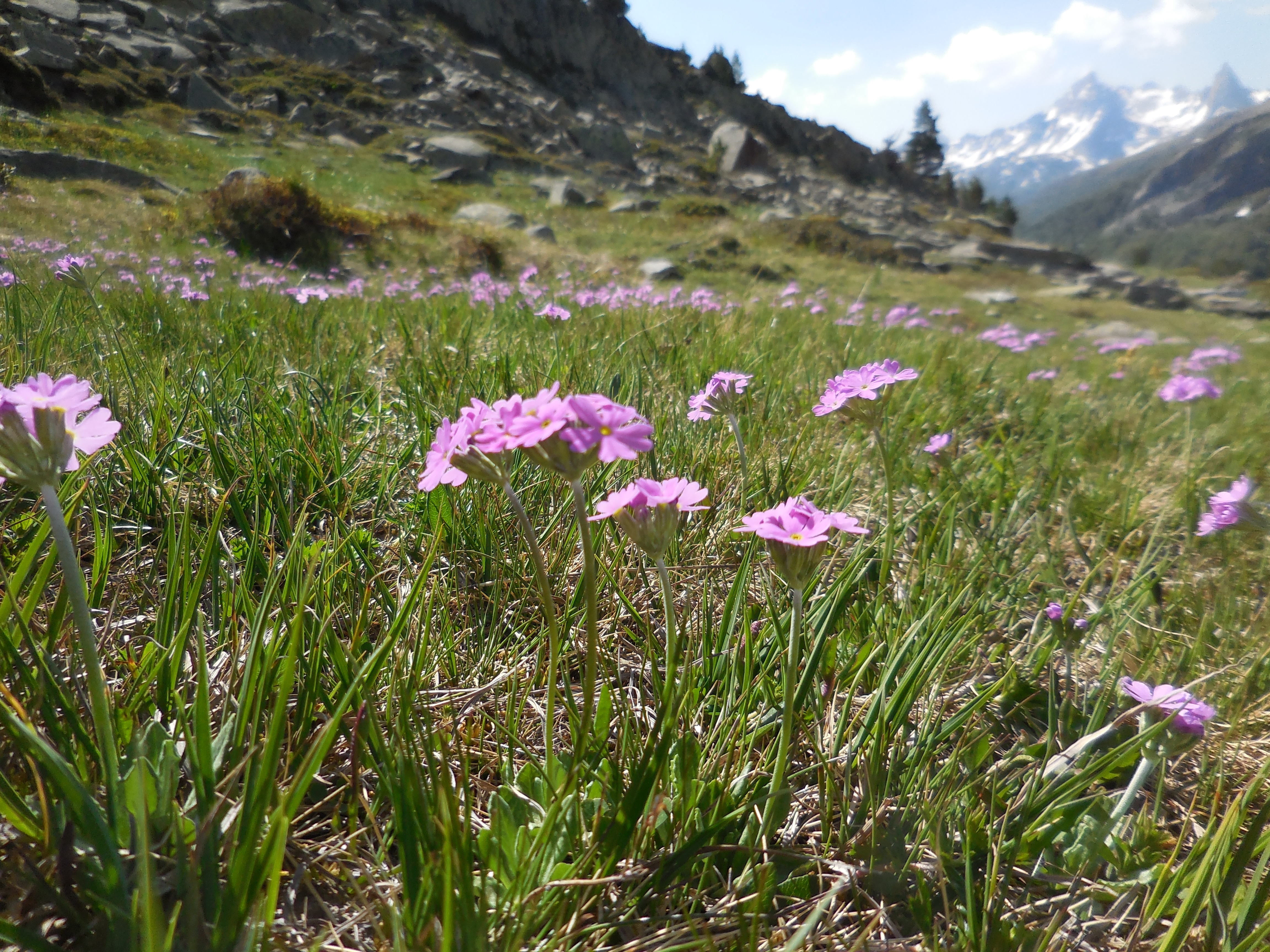 Primula farinosa vers 2200 m au-dessus de Névache. Floraison début juin.